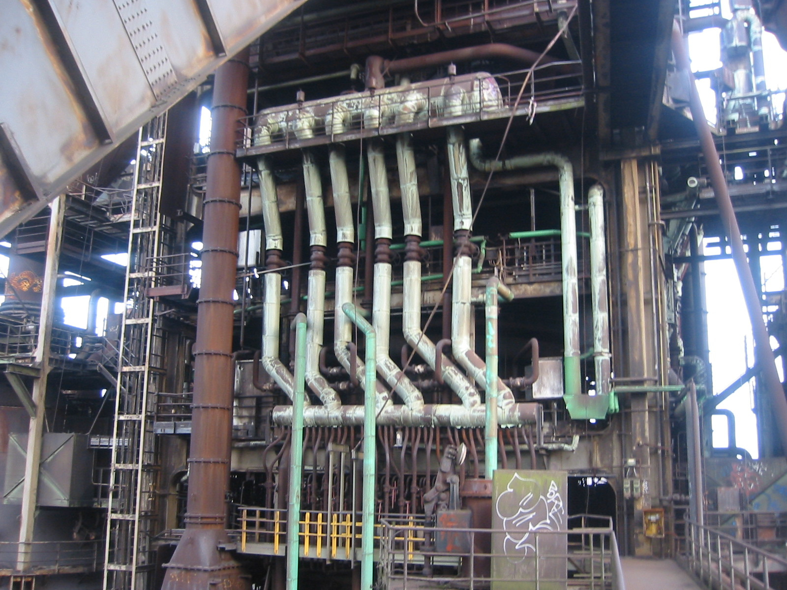 Im Hochofen, Phoenix West, Dortmund Hörde.